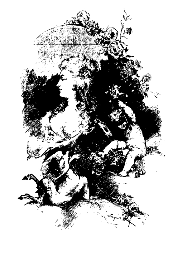 Lady Roxana